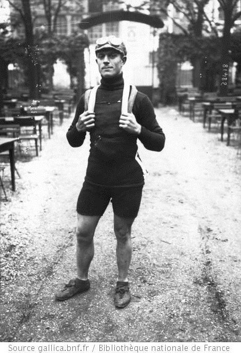 [Paris-Tours, 1913], Mottiat [portrait du coureur cycliste avant le départ]